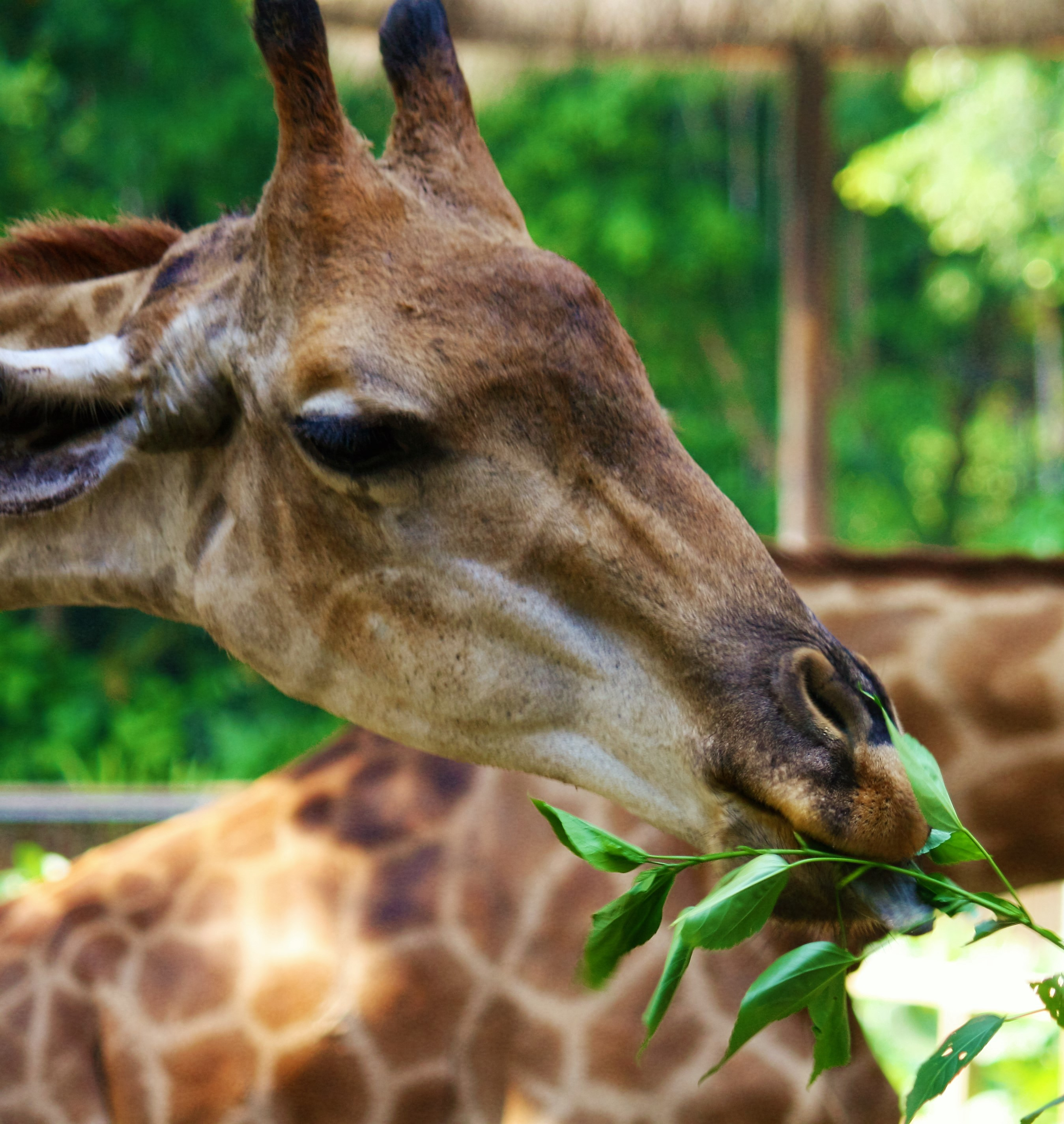 Zoo Guangzhou